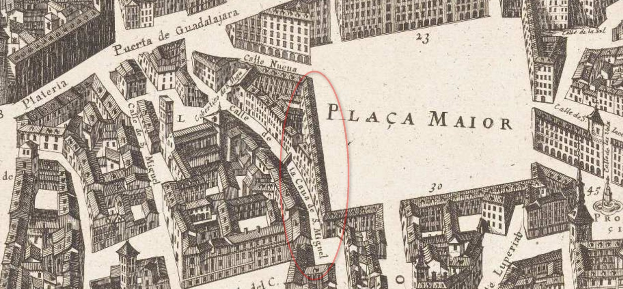 Plano de Madrid en el siglo XVII. Detalle de la calle de la Cava de San Miguel, junto a la Plaza Mayor.